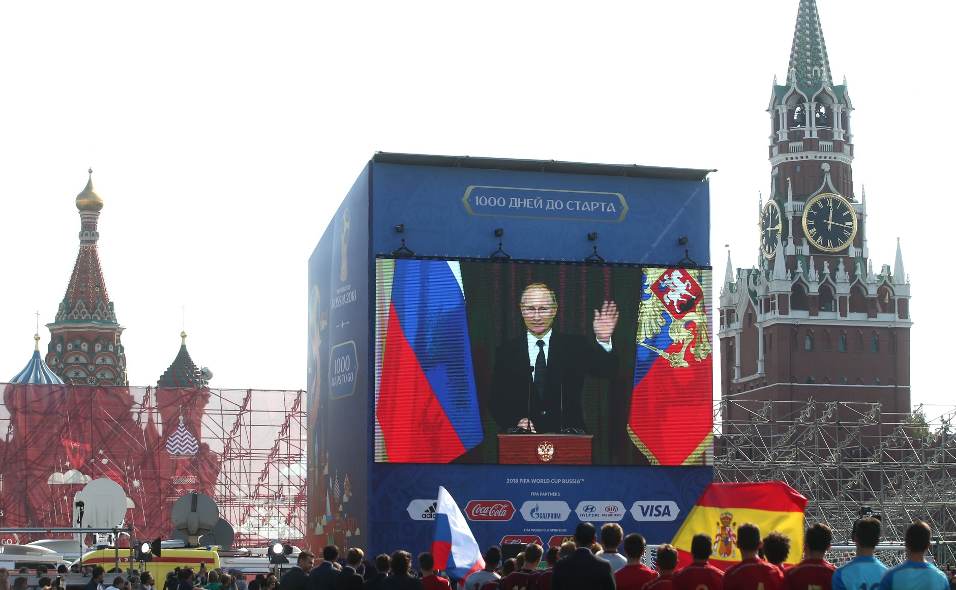 В режиме телемоста Владимир Путин поприветствовал гостей и участников церемонии запуска обратного отсчёта 1000 дней до чемпионата мира по футболу FIFA 2018 в России